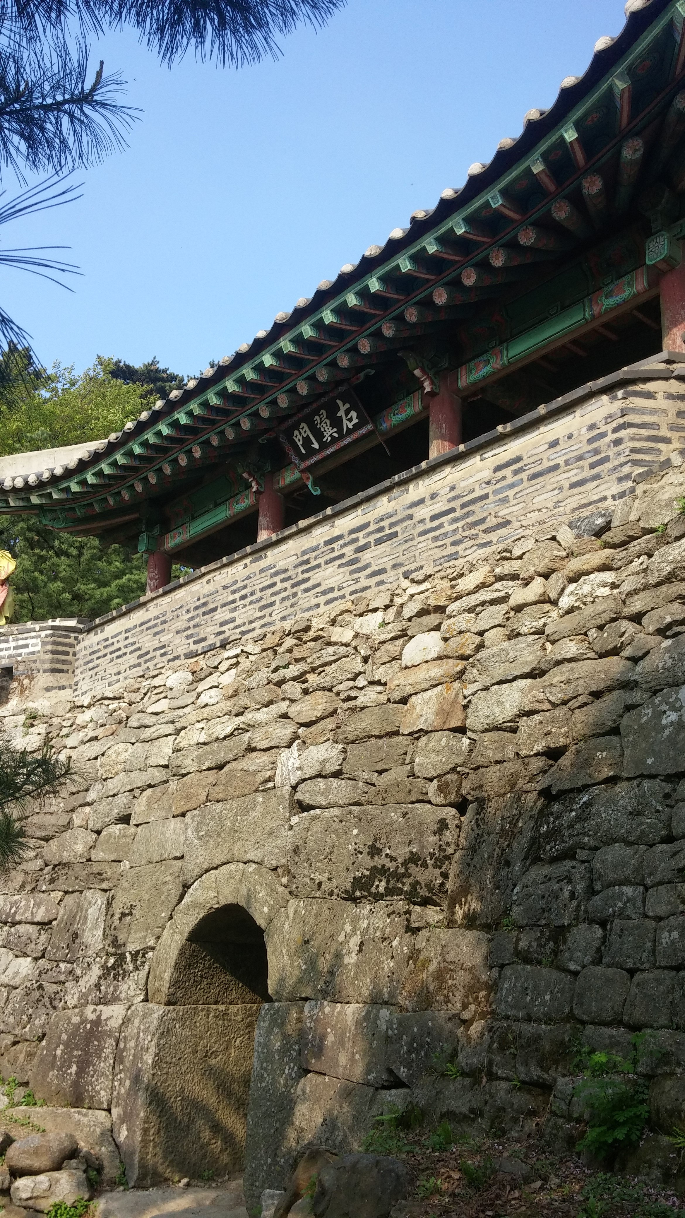 남한산성 서문 (2)